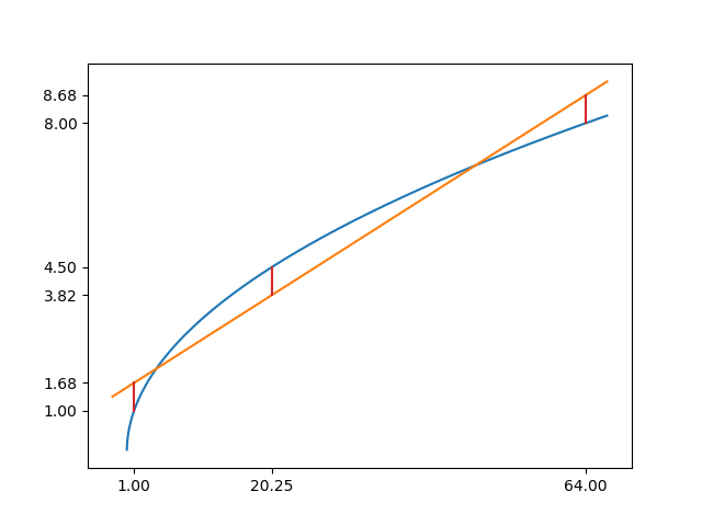 Иллюстрация наилучшего равномерного приближения функции квадратного корня на интервале от 1 до 64.